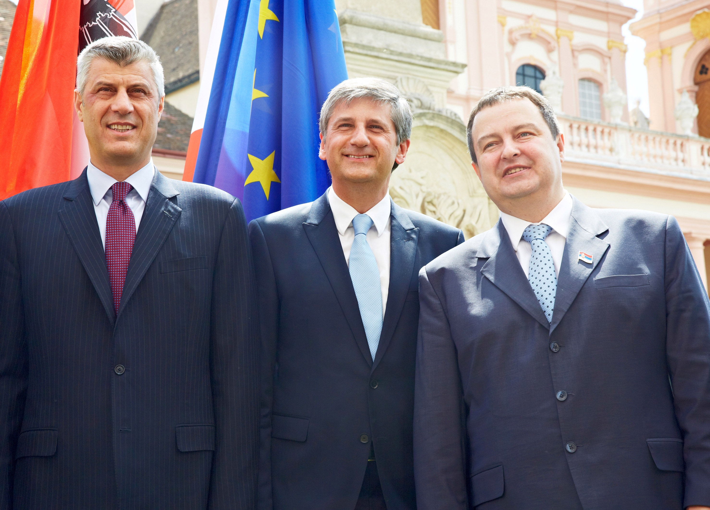 © - Wien 16.06.2013 - Aussenminister Spindelegger nahm am 18. Europa-Forum Wachau, im Stift Göttweig teil das heuer 'Jenseits der Krise - Umrisse eines neuen Europas' zum Thema hatte PHOTO: Aussenminister Michael Spindelegger (M) zusammen mit Hashim Thaçi (L), dem Premierminister des Kosovo und Ivica Da i (R), Ministerpräsident von Serbien